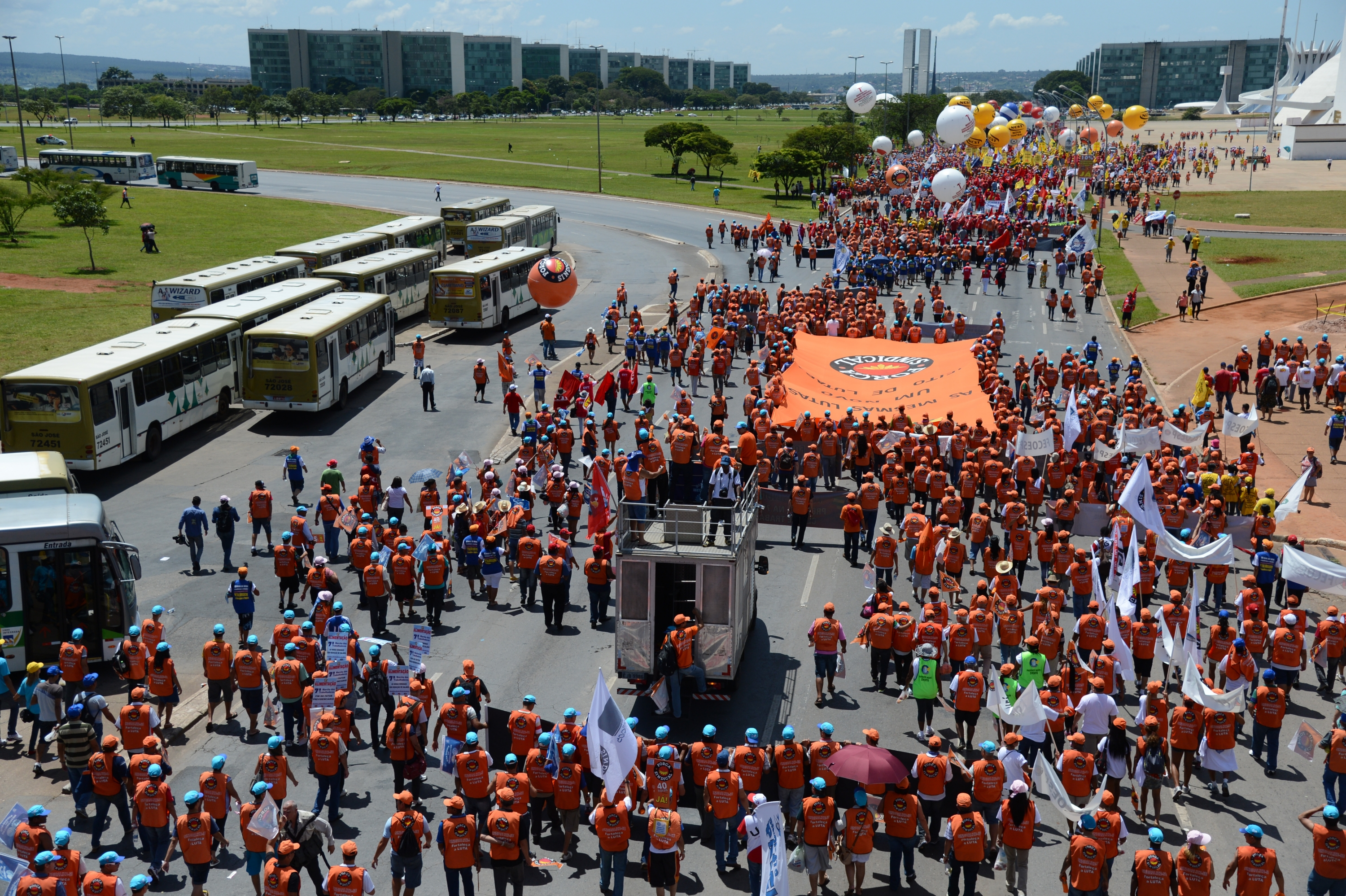 Brasília - 7ª Marcha a Brasília organizada pela Força Sindical, pela Central Única dos Trabalhadores (CUT), pela Central dos Trabalhadores e Trabalhadoras do Brasil (CTB), pela Nova Central e pela União Geral dos Trabalhadores (UGT). Marcello Casal Jr./ABr